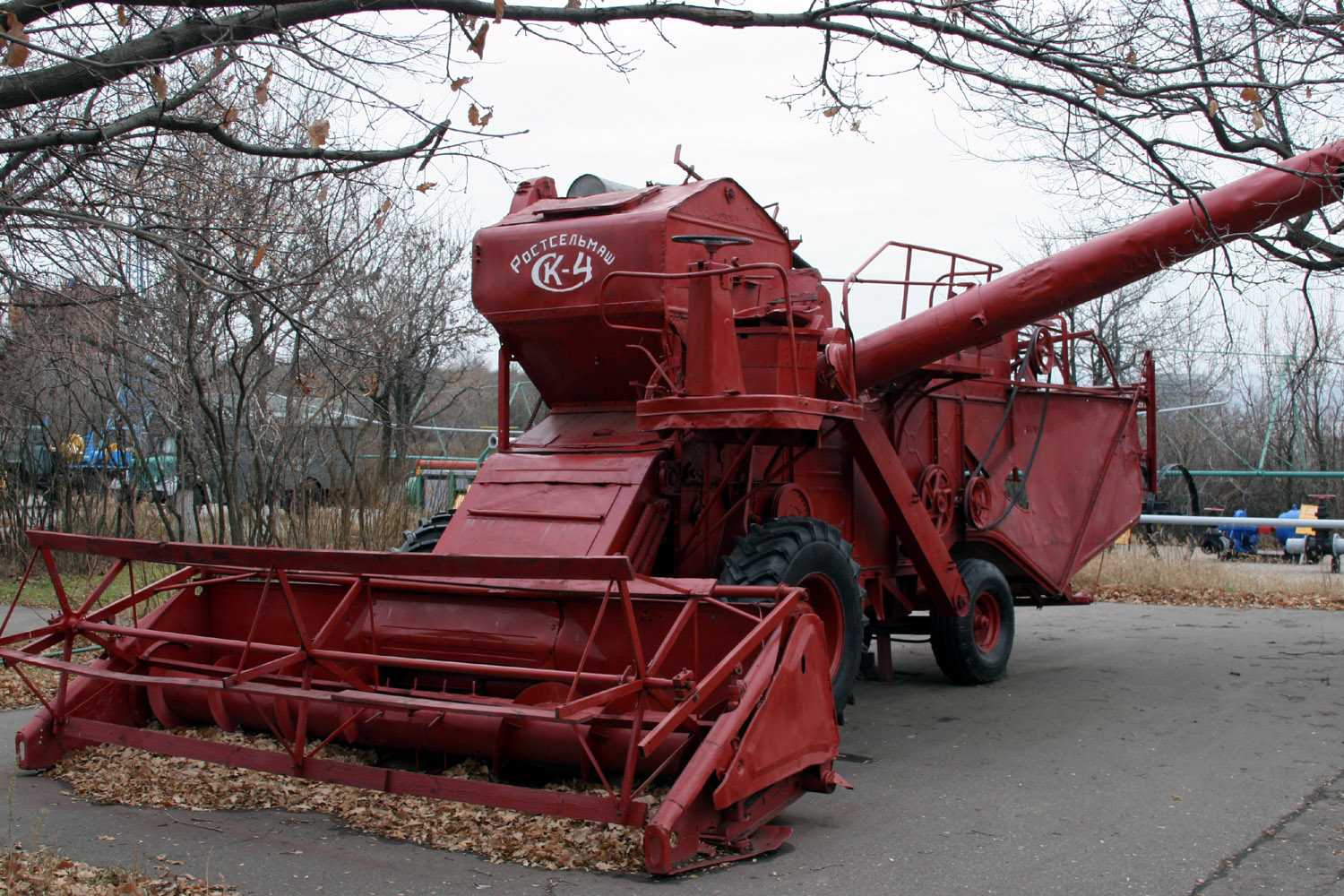 Комбайн СК-4 в Саратове на Соколовой горе